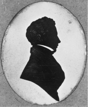 Portret van Louis Napoleon van der Goes Dirxland (1806-1885), silhouet, 8,5 x 7 cm niet gesigneerd, niet gedateerd In ovaal.Techniek: pen in bruin, penseel in zwart. Medegedeeld door O.L. van der AA, augustus 1960. Beschrijving: kort krullend haar, opstaande witte boord, zwarte jas.